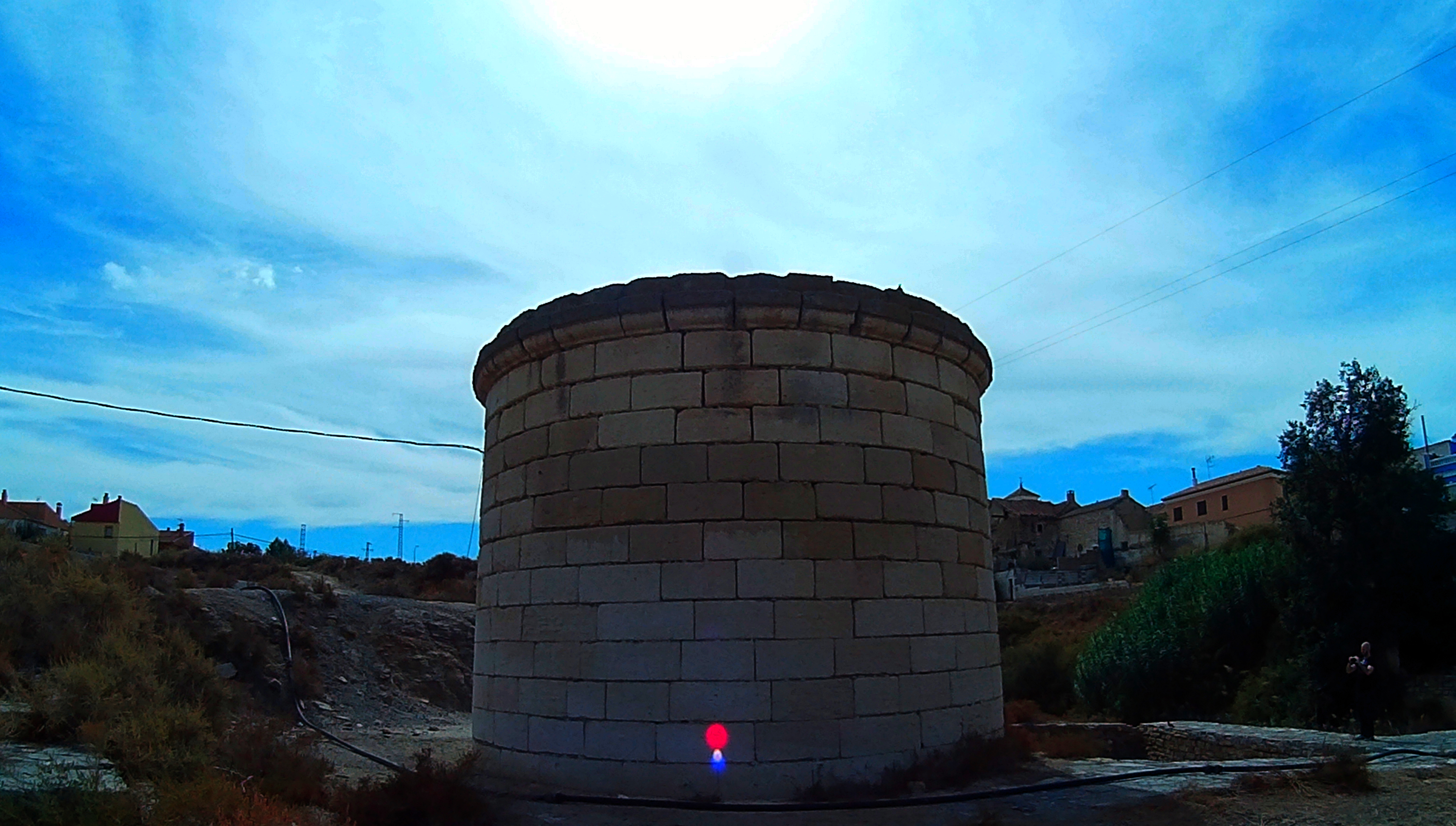 Torre